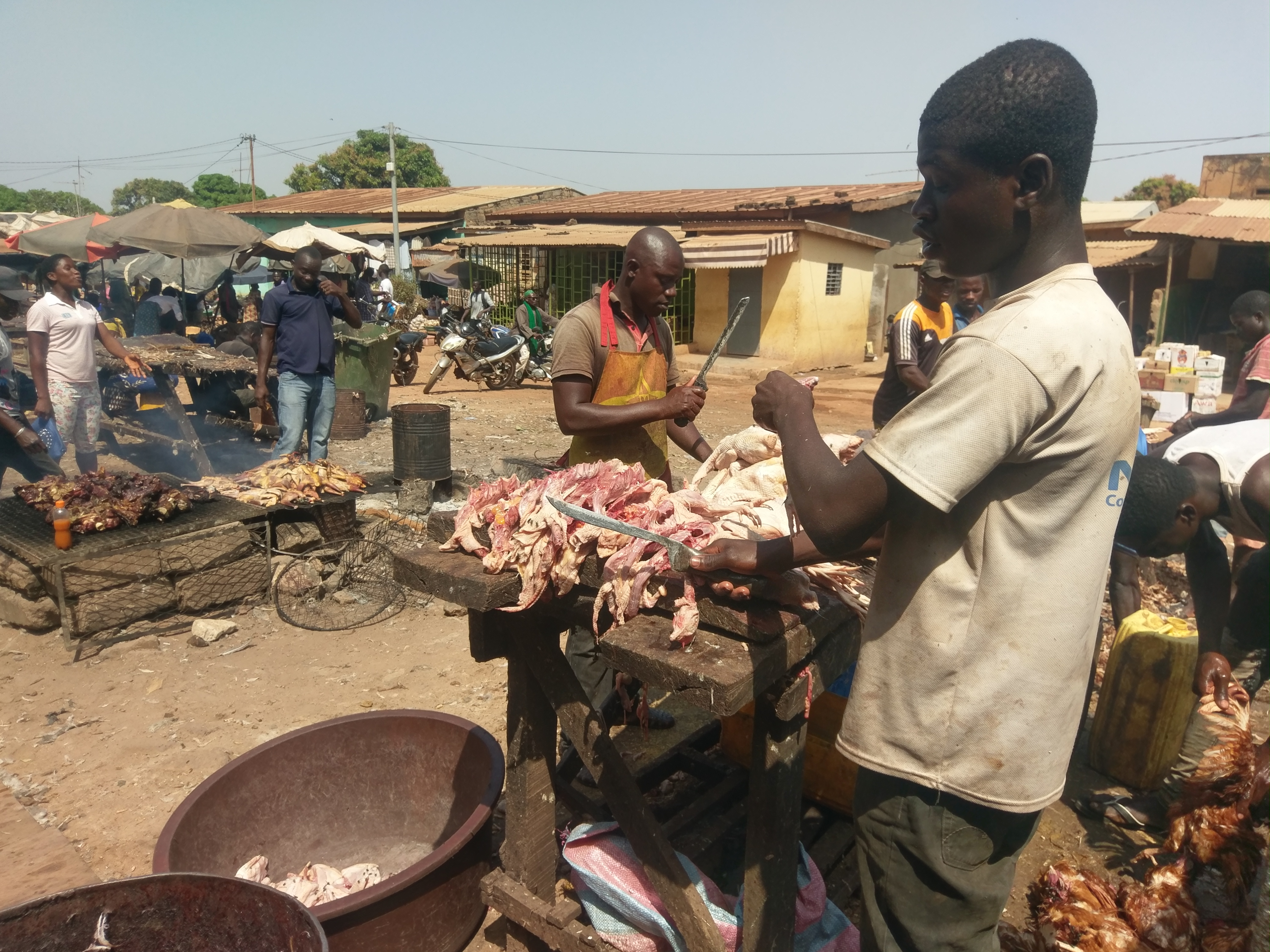 Vendeur et braiseur de volaille de Korhogo, ville du Nord de la Côte d'Ivoire. This is an image of "African people at work" from Ivory Coast